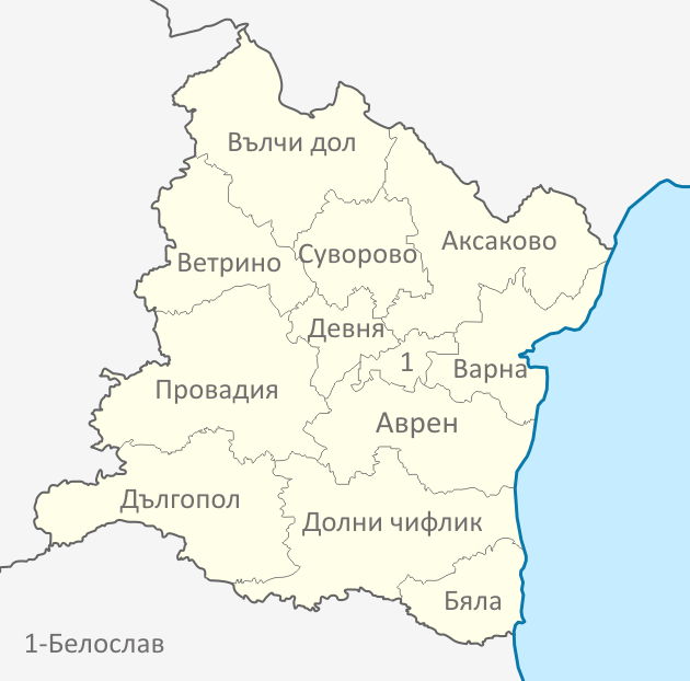 Картата е създадена от Любомир Таушанов